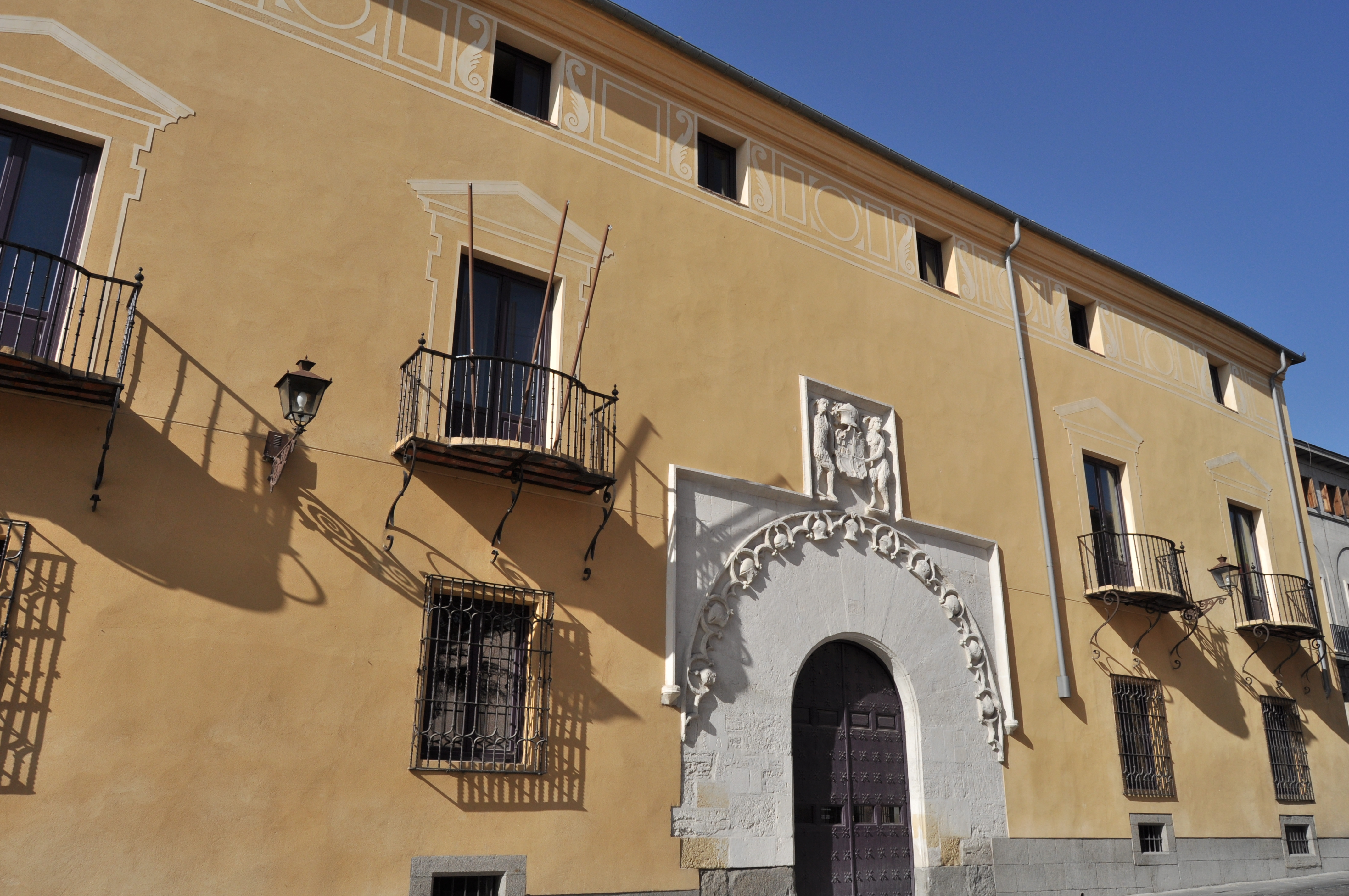 Segovia Capital - 028